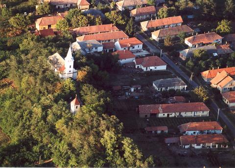 Karos, Hungary, aerialphotography